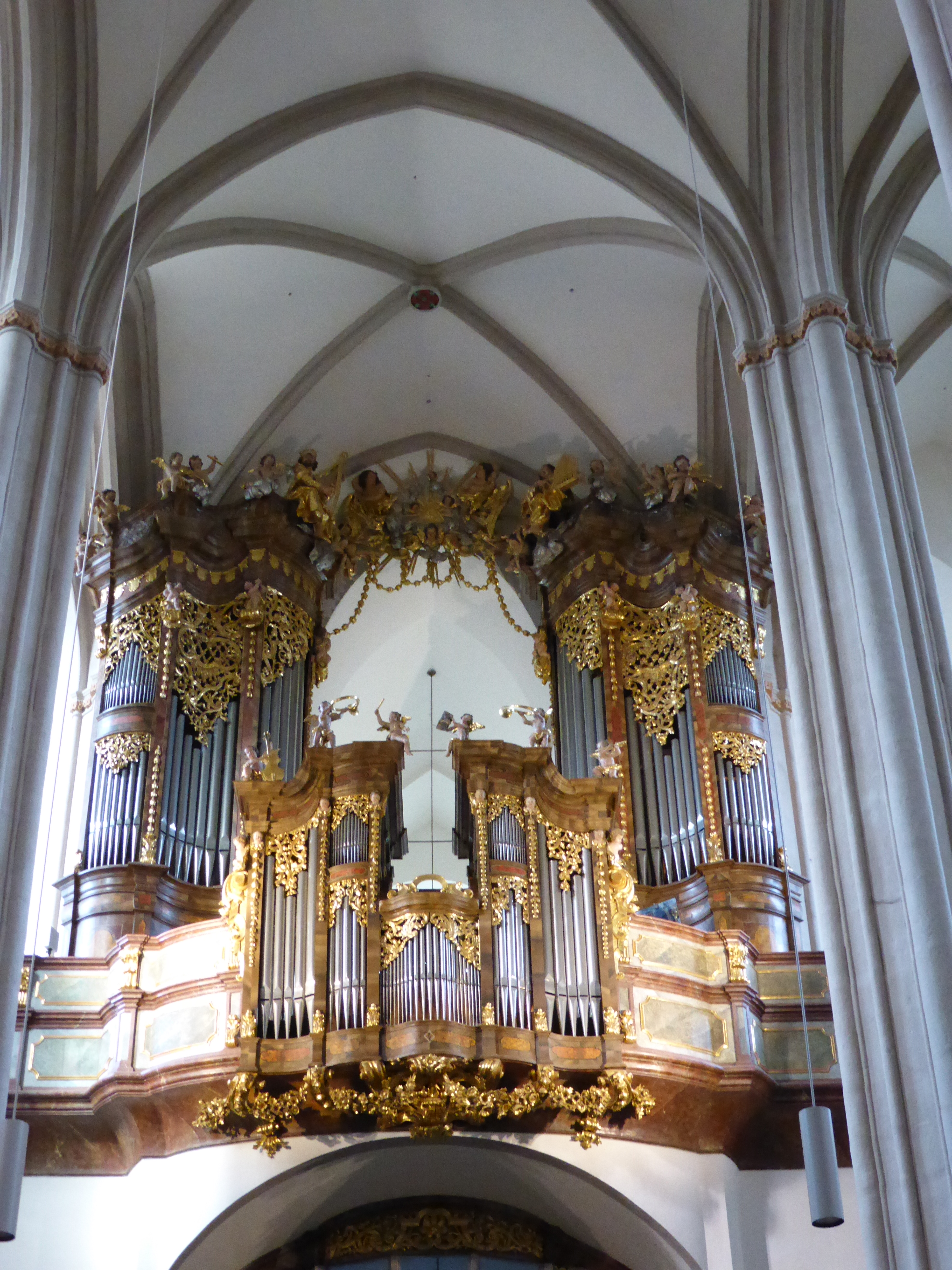 Ignaz Egedacher-Orgl des Stiftes Zwettl aus dem Jahre 1731